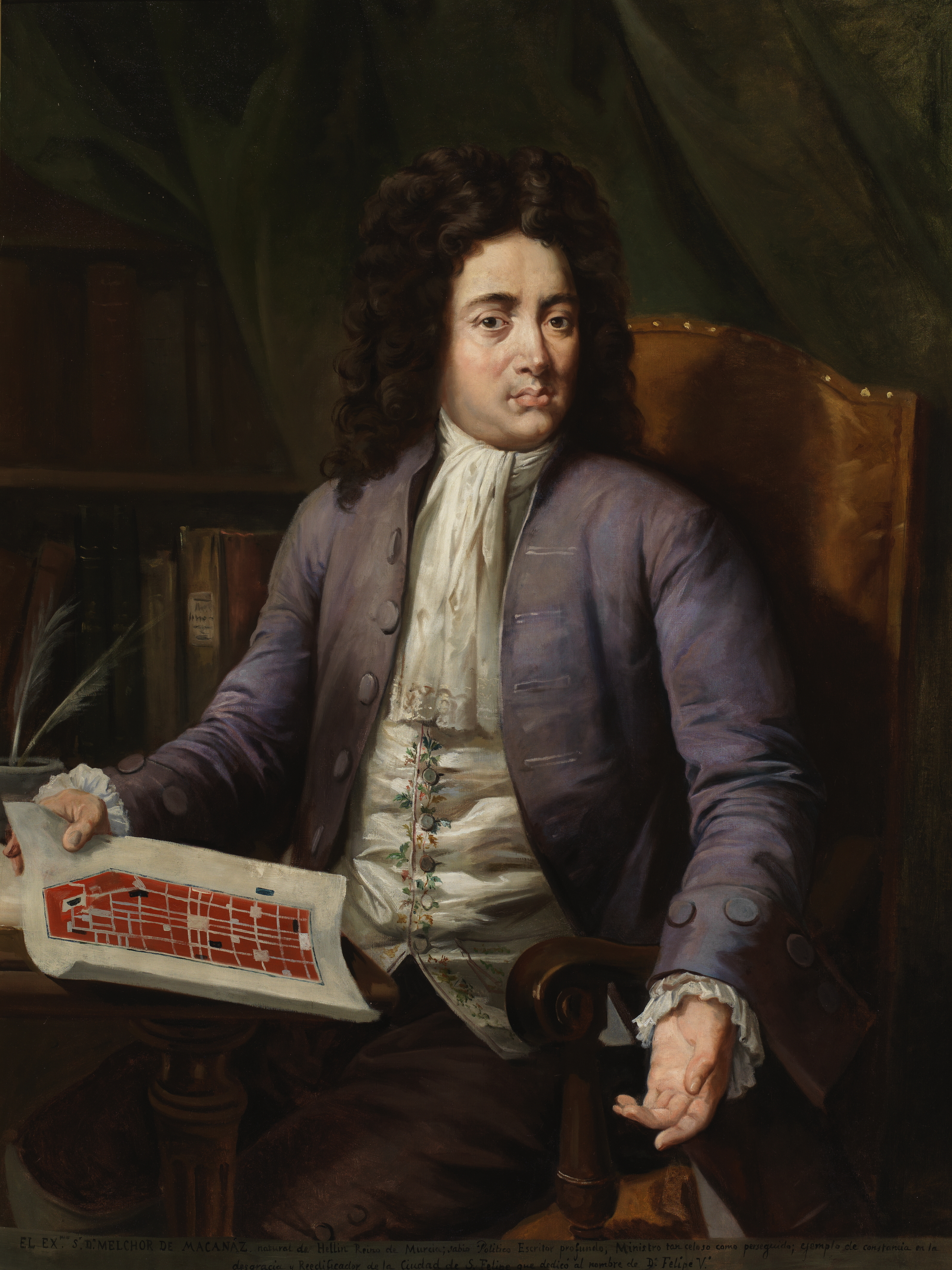 Retrato del ilustrado y politico español Melchor Rafael de Macanaz (1670-1760).